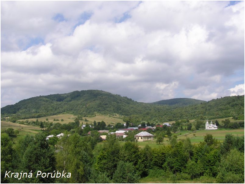 Celkový pohľad